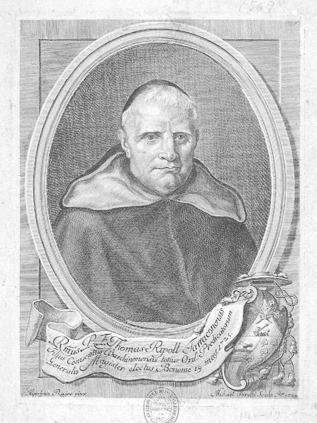 Retrato de fray Tomás Ripoll. Aguafuerte de Miquel Sorelló por pintura de Hipólito Rovira. Firmado: Hippolytus Rouira pinx. ; Michael Sorelló Sculp. R.æ 1729. Inscripción: "Rmus. P. F. Thomas Ripoll Tarraconensis Filius Conuentus Barchinonensis totius Ord. Predicatorum Generalis Magister electus Bononie 19 may 1725." Biblioteca Nacional de España